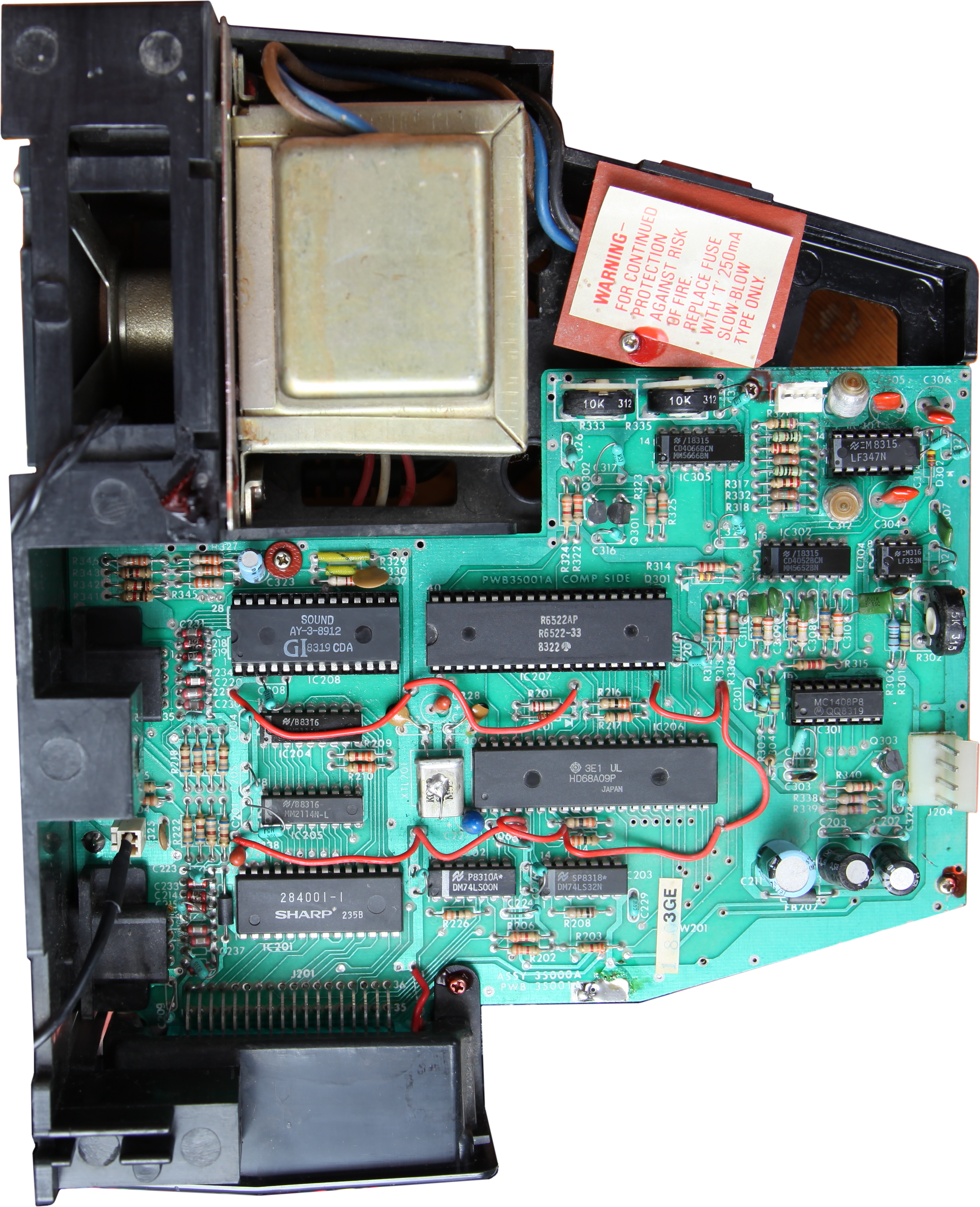 Vextrec Logic Board